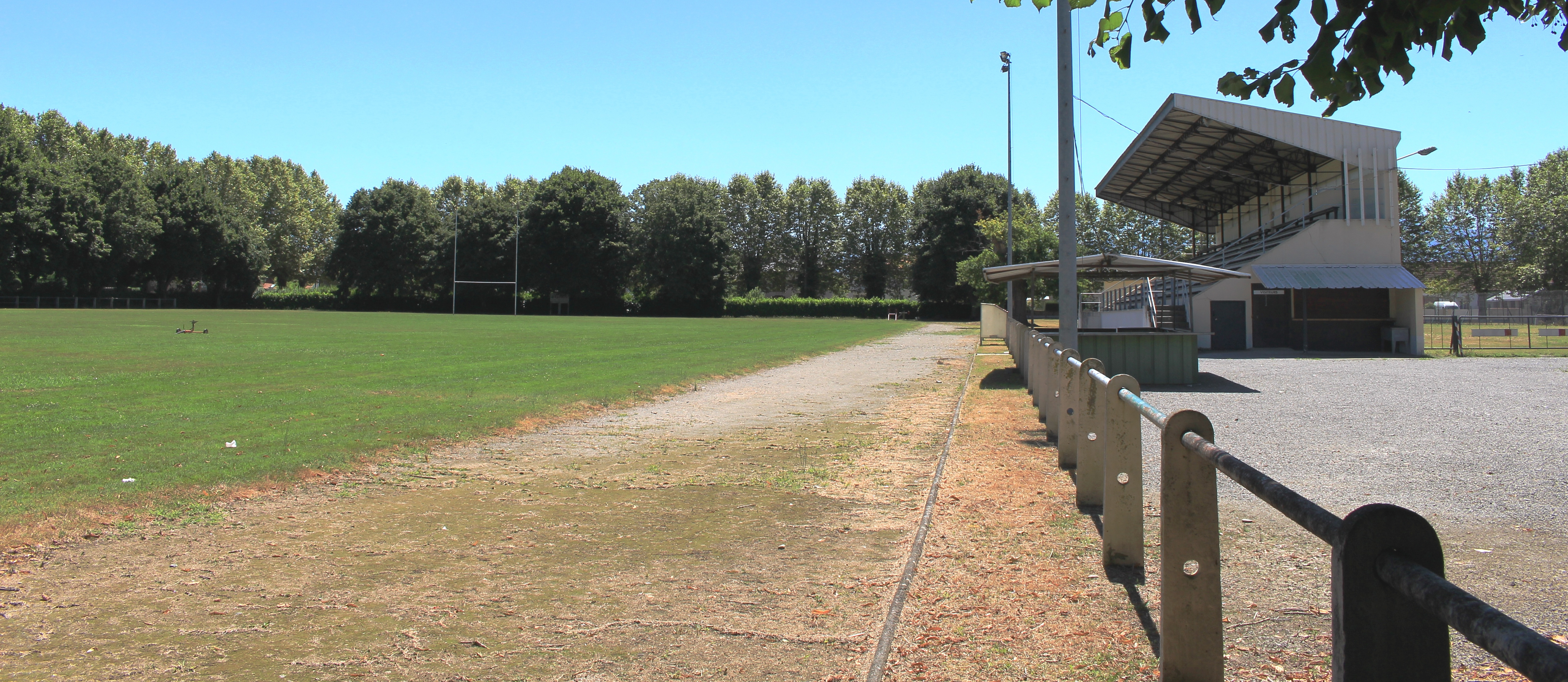 Stade de rugby de Laloubère (Hautes-Pyrénées)